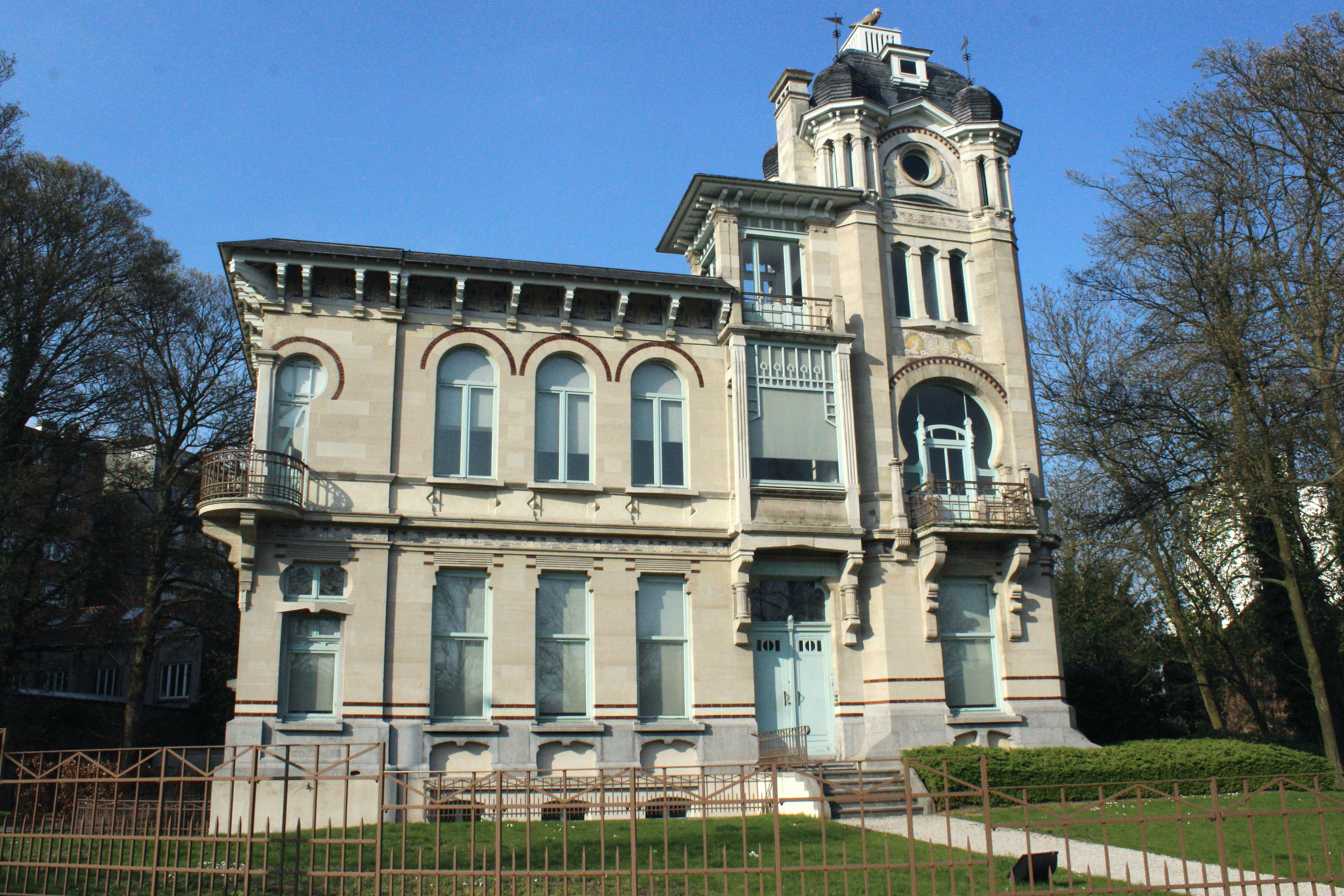 Bruxelles avenue Franklin-Roosevelt 86. Maison Delune (vers 1907)